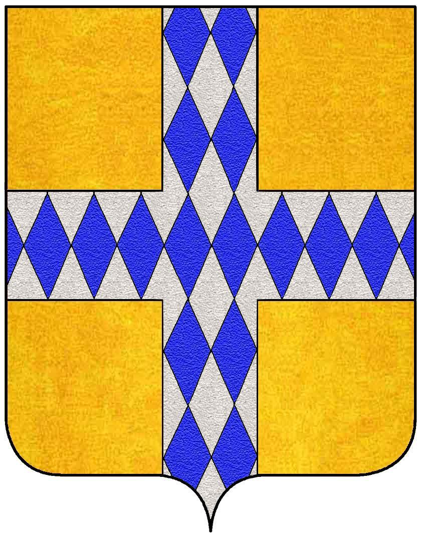 Coa_fam_ITA_ardinghelli 4 bis